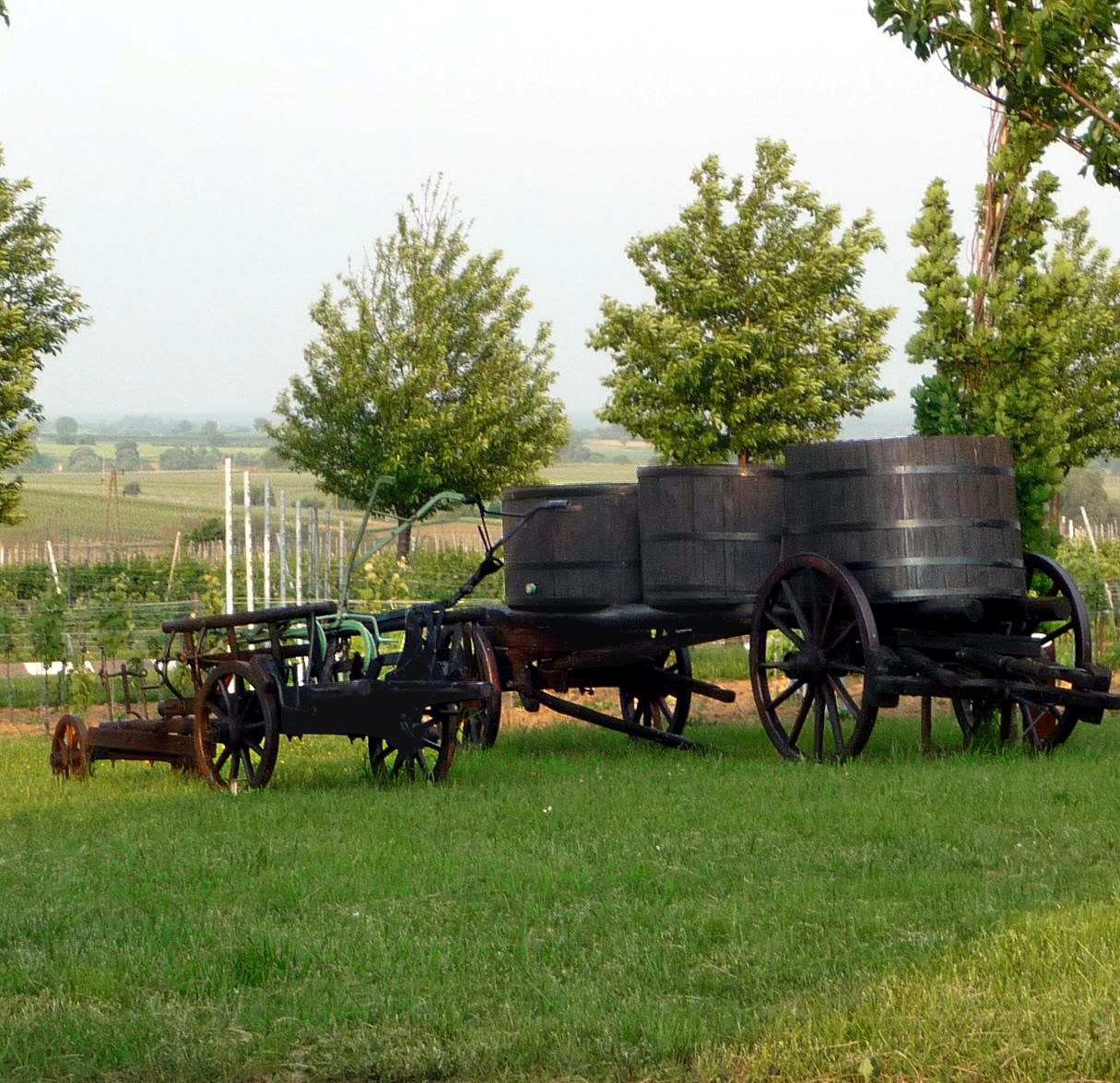 alte Transportfahrzeuge